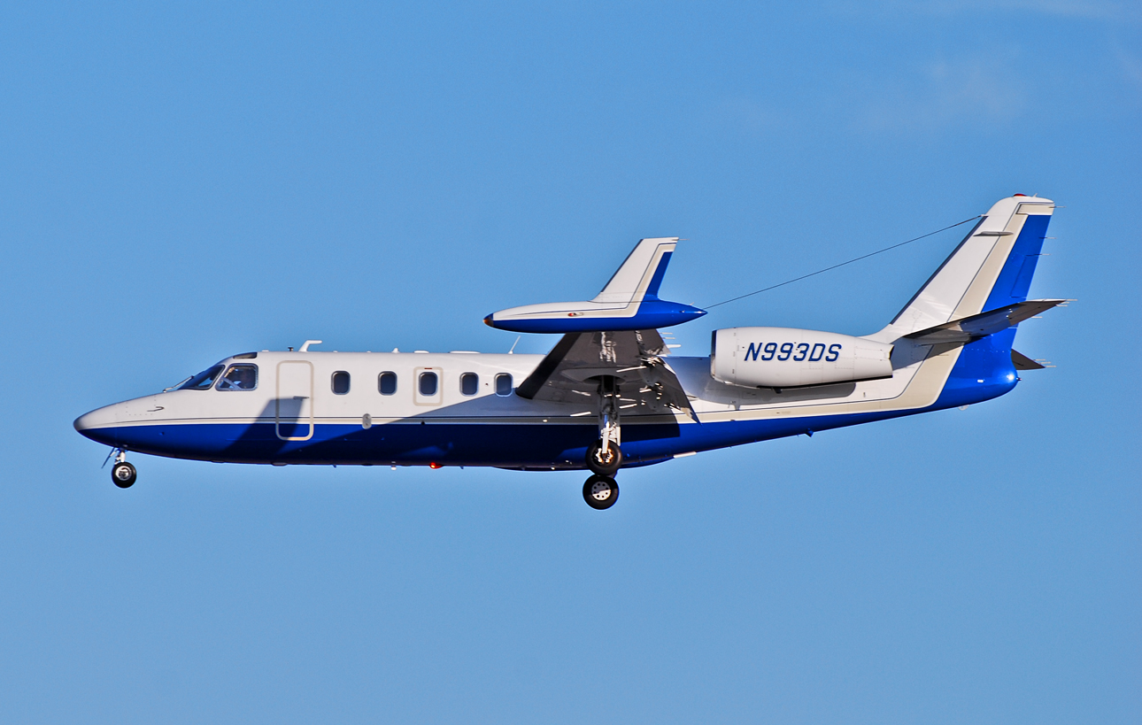 Las Vegas - McCarran International (LAS / KLAS) USA - Nevada, March 8, 2012 Photo: Tomás Del Coro